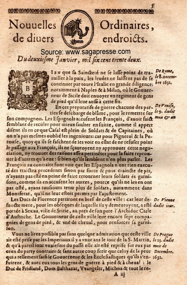 Premier exemplaire des Nouvelles Ordinaires de Divers Endroits figurant dans les publications de Théophraste Renaudot, le 2 janvier 1632.